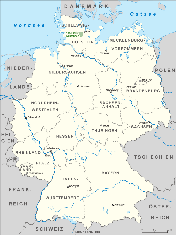 Karte des Naturparks Westensee in Deutschland